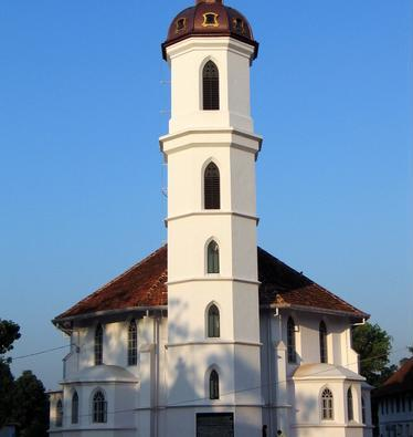 മെത്രാപ്പോലീത്തൻ സെൻറ് മേരീസ്‌ പള്ളി